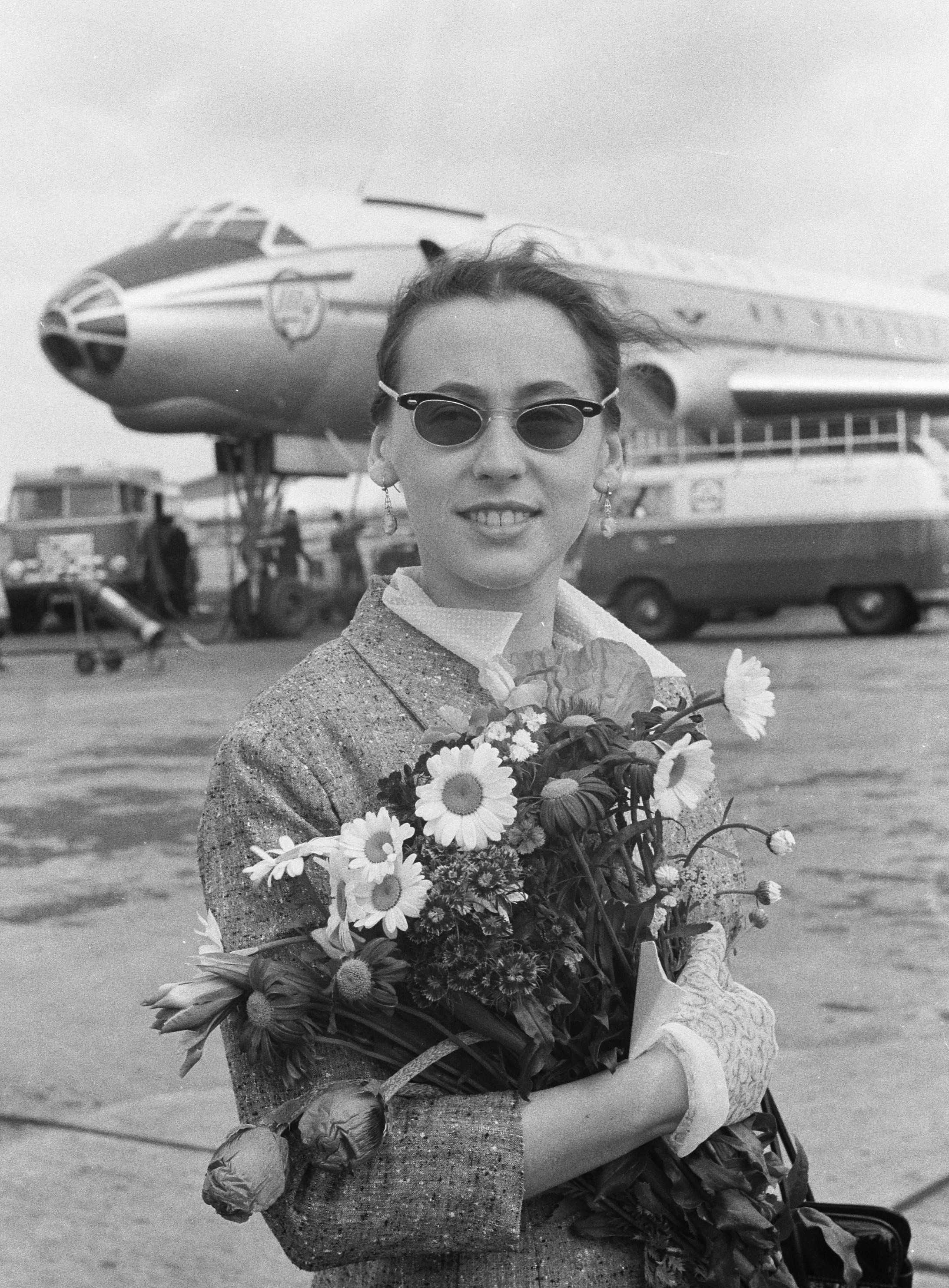 Aankomst solisten van het Bolshoiballet op Schiphol, jong danseres Nina Timofeeva. Location: Schiphol, Noord-Holland